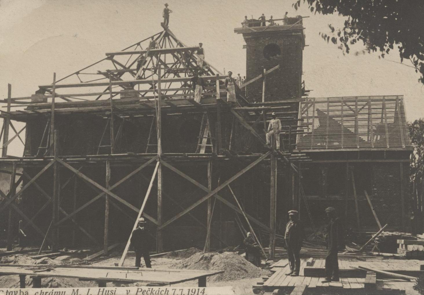 Stavba evangelického kostela v Pečkách 7. července 1914